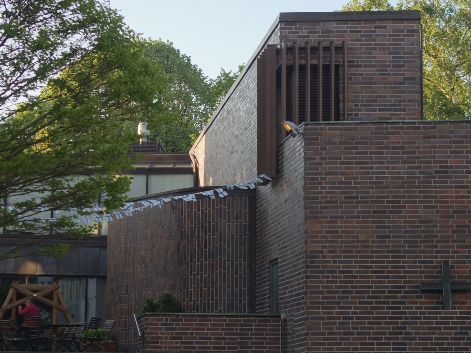 Finnische Seemannskirche in Hamburg